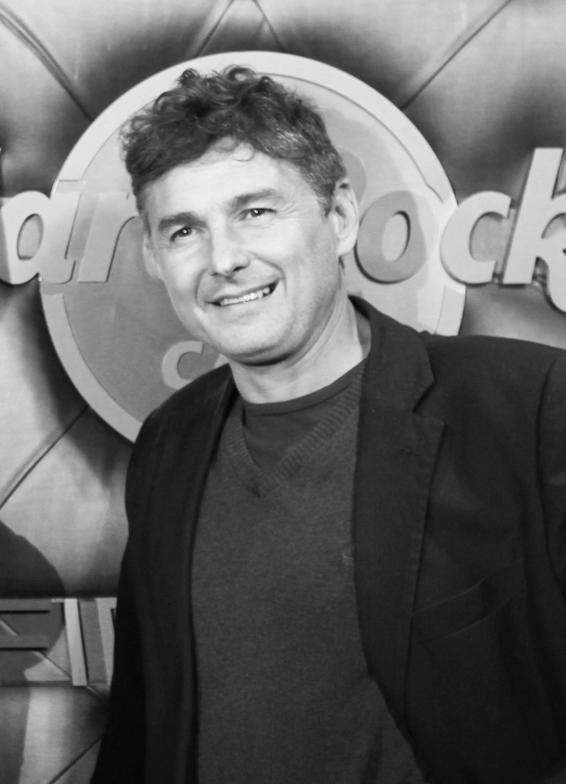 Alessandro Paci